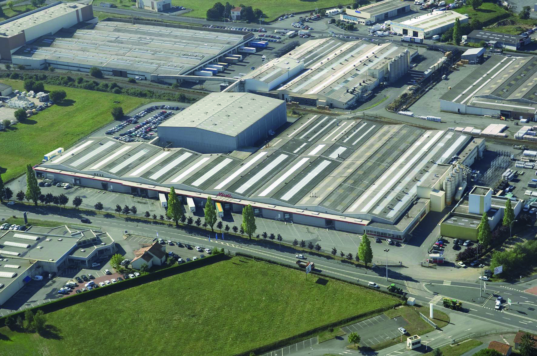 Vue aérienne d'une usine Nicoll à Cholet (site de Bel-air)